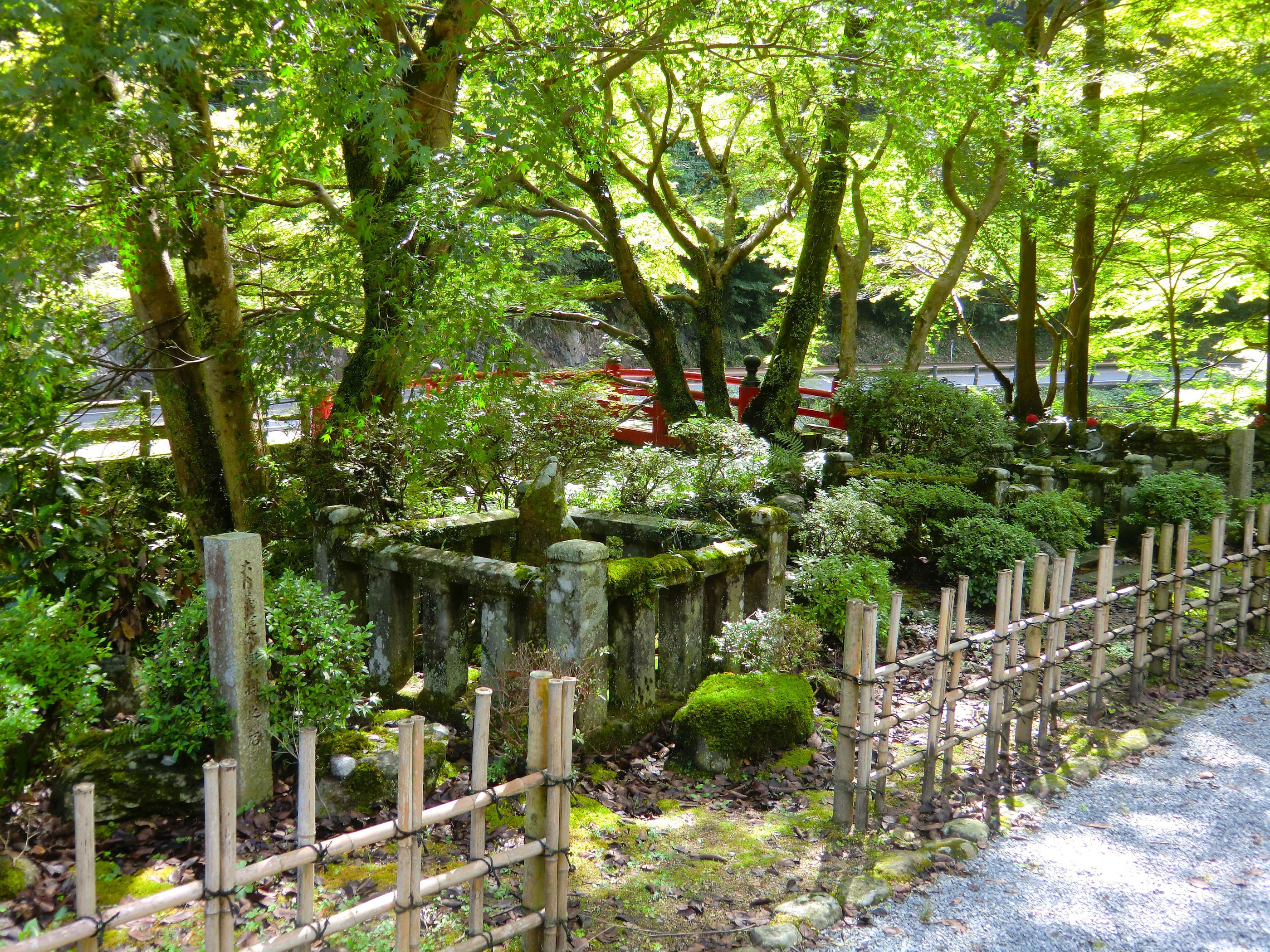 大寧寺にある「姿見の池」と「かぶと掛けの岩」（山口県長門市）